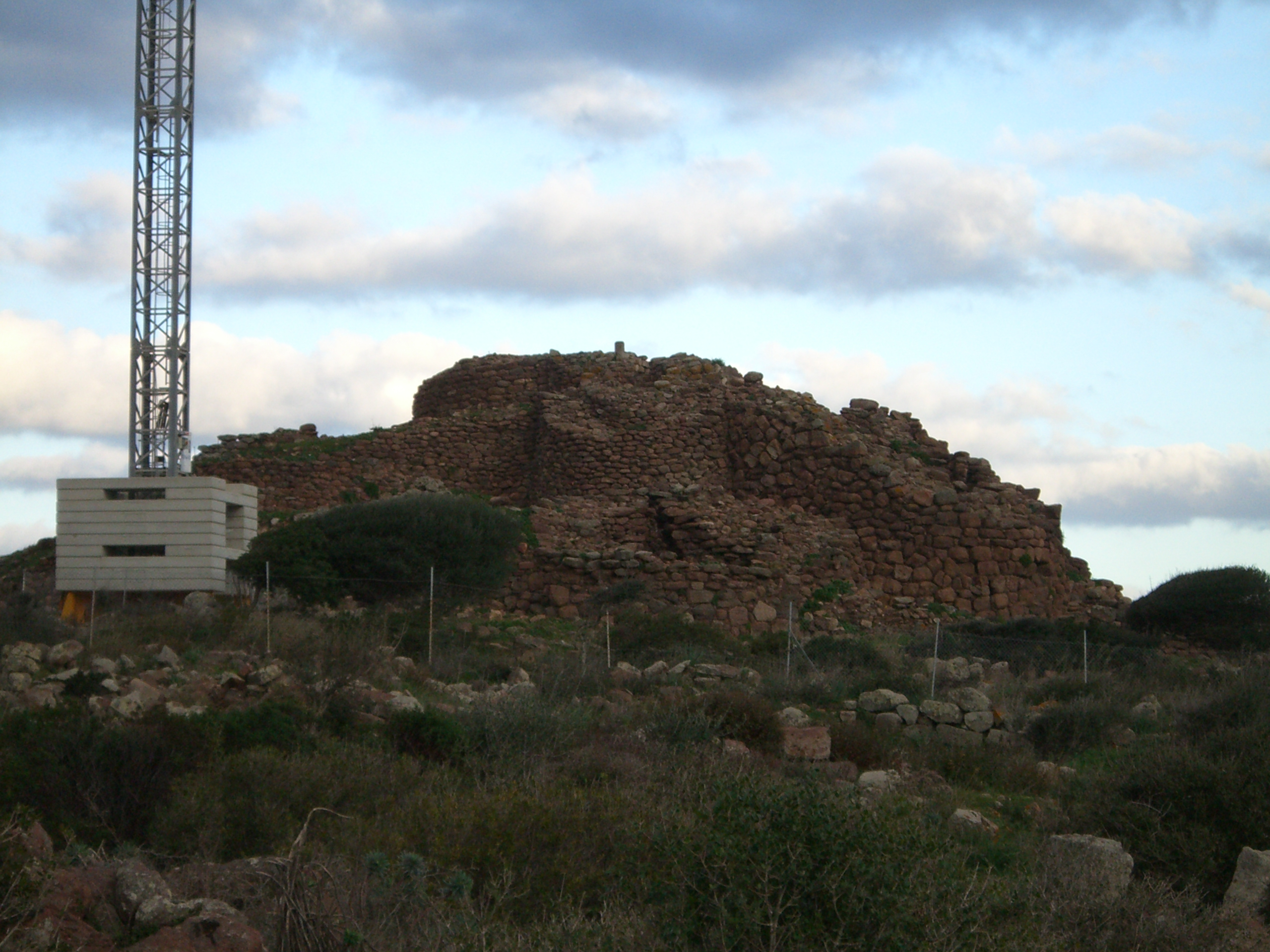 Vista della reggia nuragica di Seruci (Gonnesa)